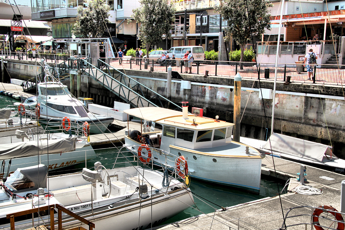 Auckland, New Zealand